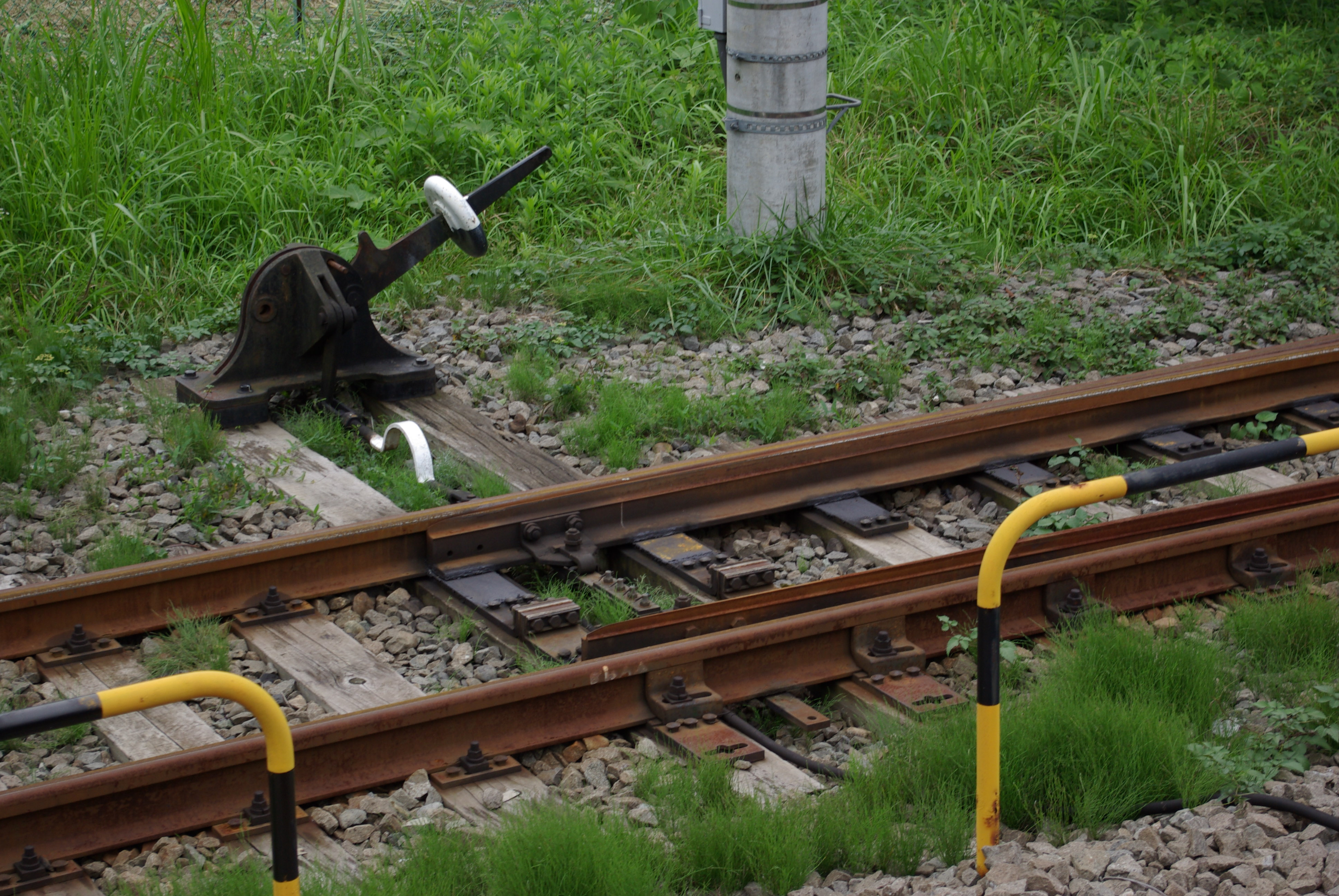 ダルマ転轍器